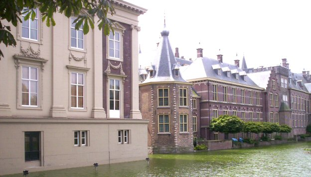 Hofvijver in Den Haag - eigen foto Gebruiker:Känsterle 13 juli 2004 public domain (als de zon schijnt zal ik een betere foto maken)